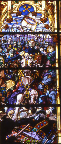 Sancho el Fuerte de Navarra, vidriera en Roncesvalles. Autor Rafaelji. Diapositiva 35 mm. Tomada en agosto de 1989.